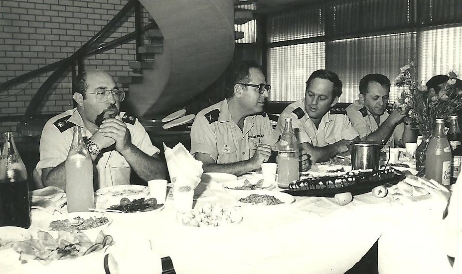 מפגש ראשי מחלקות במספן המודיעין הימי בשנת 1982